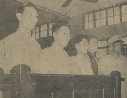 题名： 經擠的犯罪者杜維屛等被判刑（附照片） 文献来源： 《东风画报》 出版时间： 1948 年 卷期(页)： [ 第47期 ，6页 ] 中图分类号： K296.58